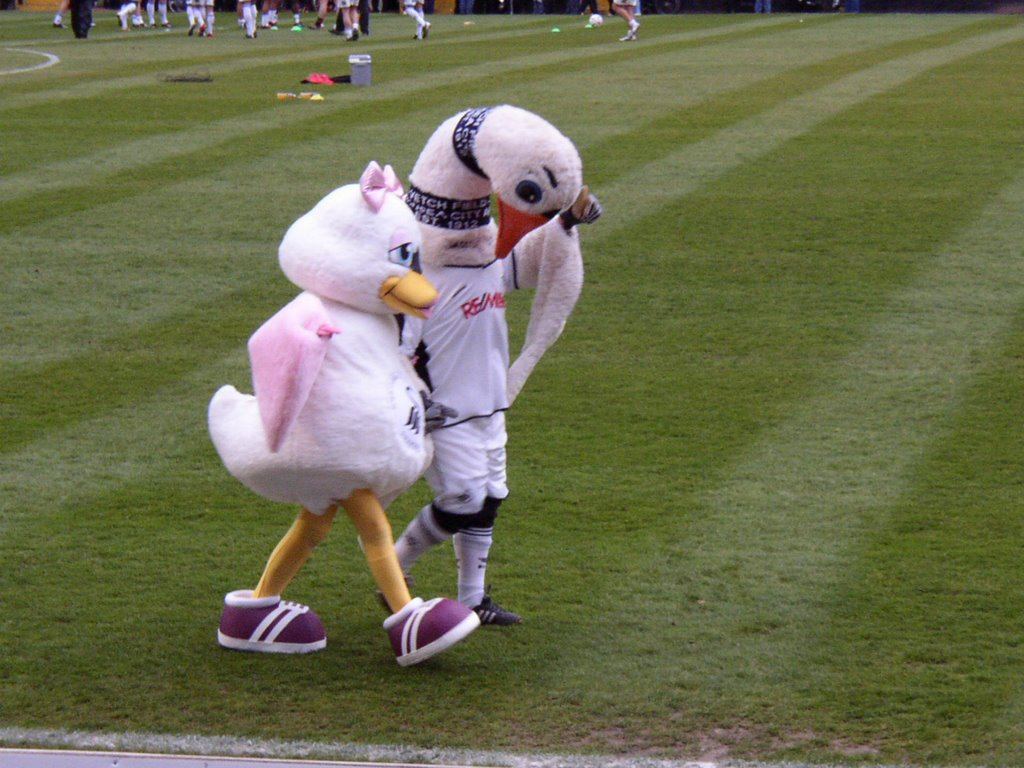 Cyril and Cybil the swan